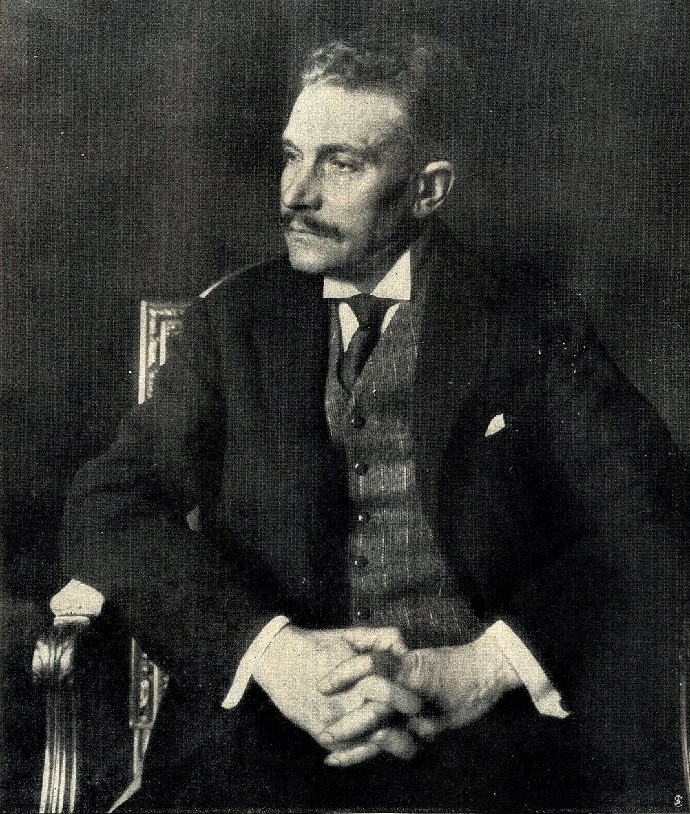 Karl Max von Lichnowsky, der neue deutsche Botschafter in London, 1912